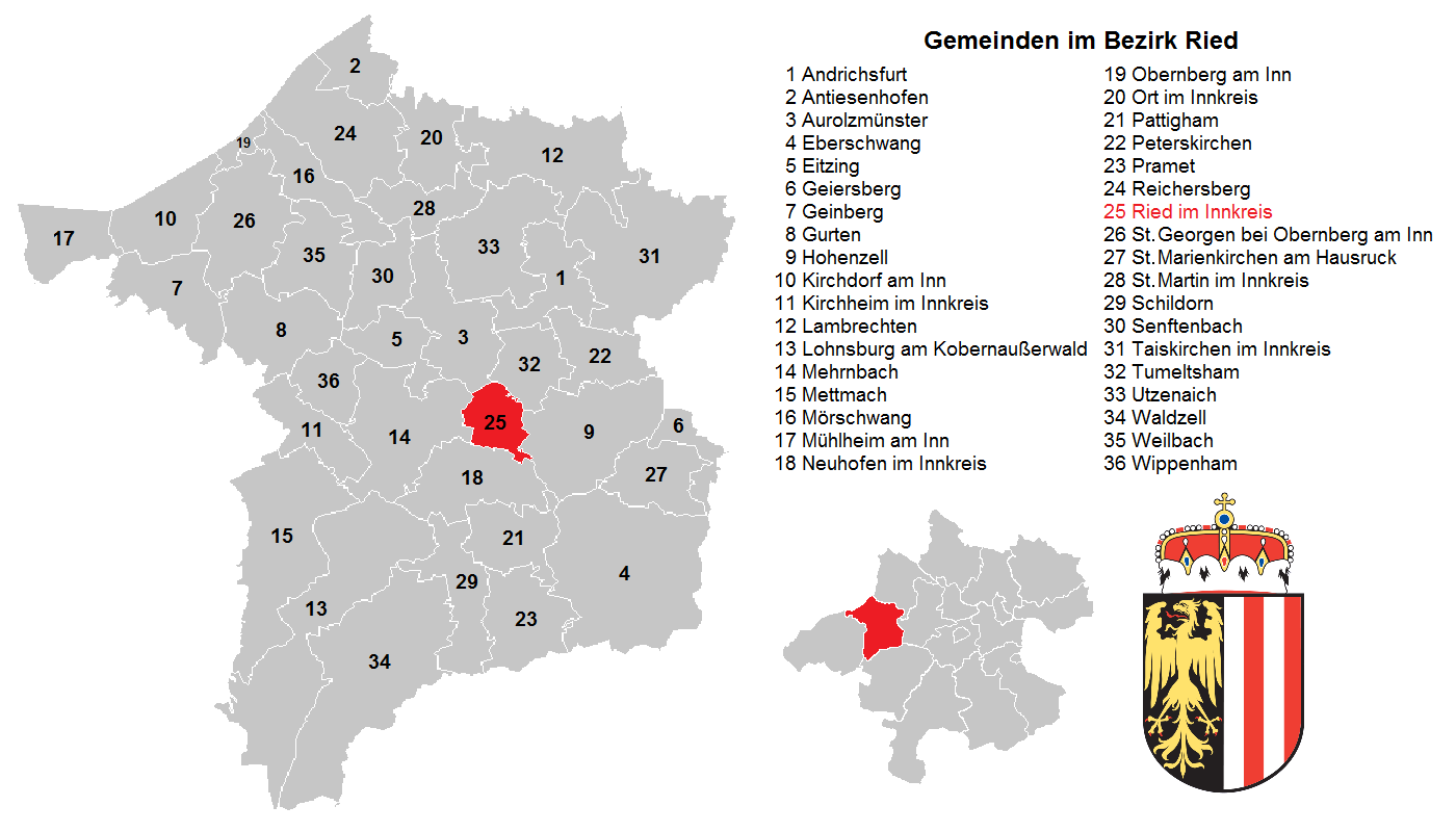 Bezirk Ried im Innkreis